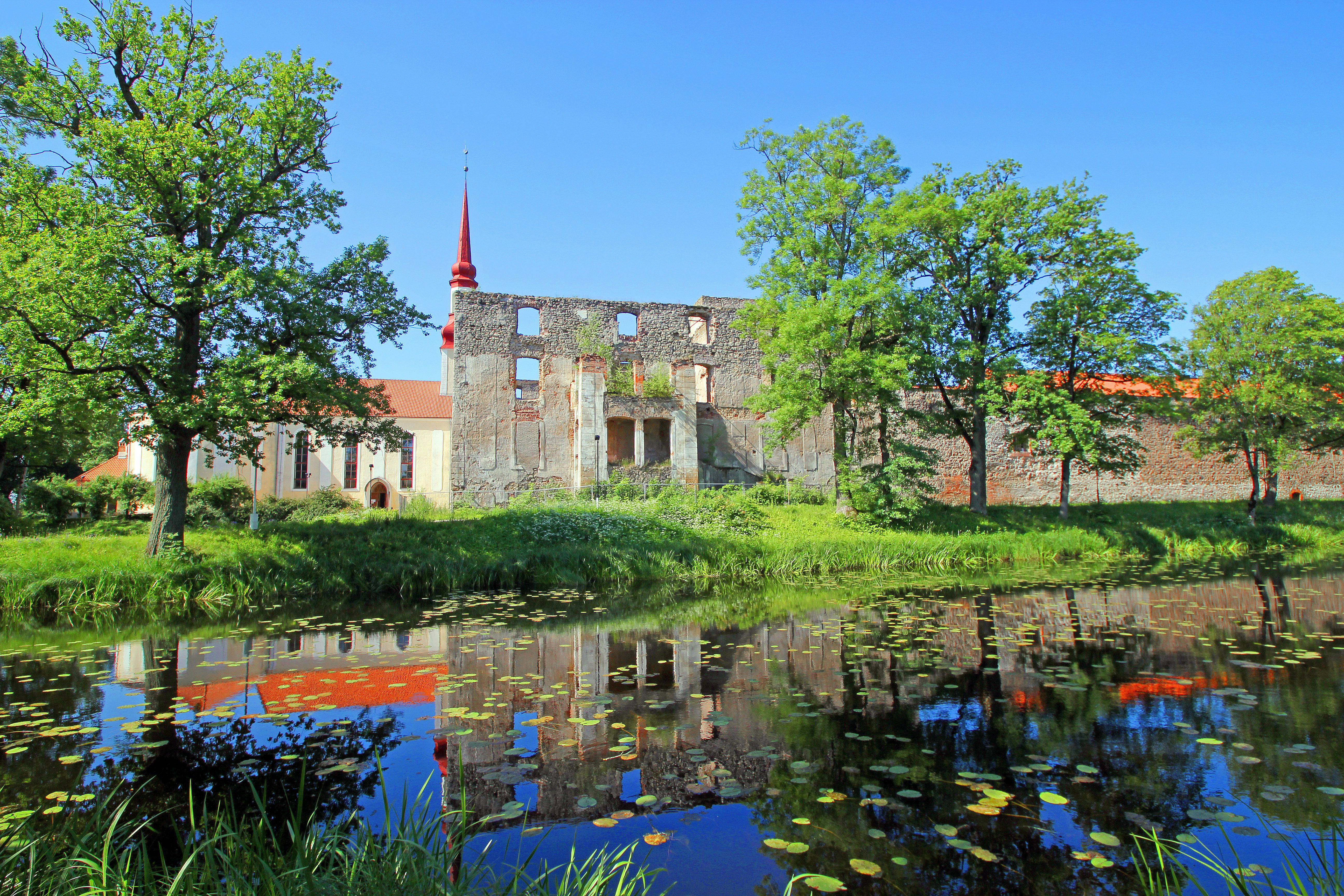 Põltsamaa linnuse varemed